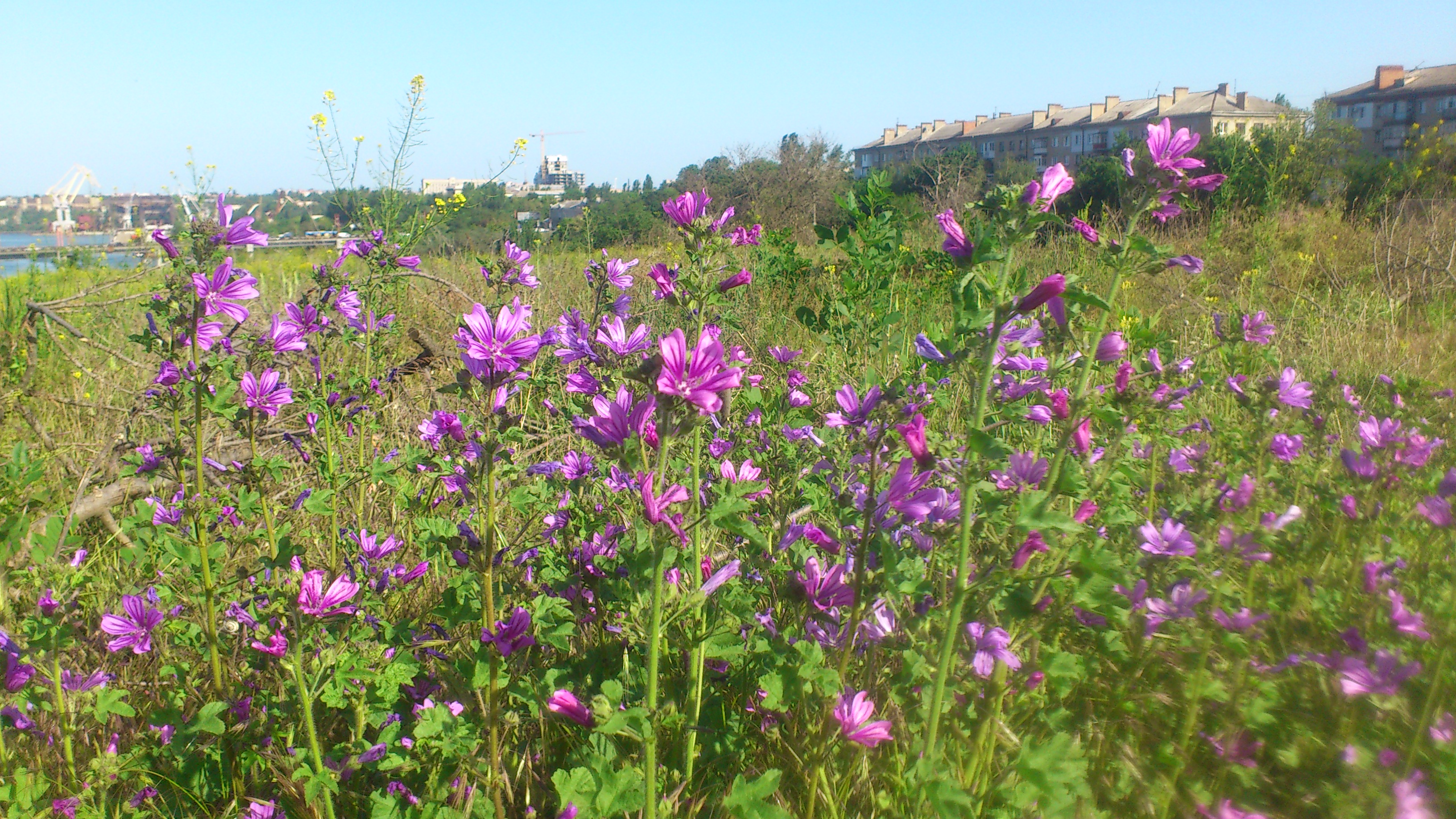 Квіти в Дикому Саду